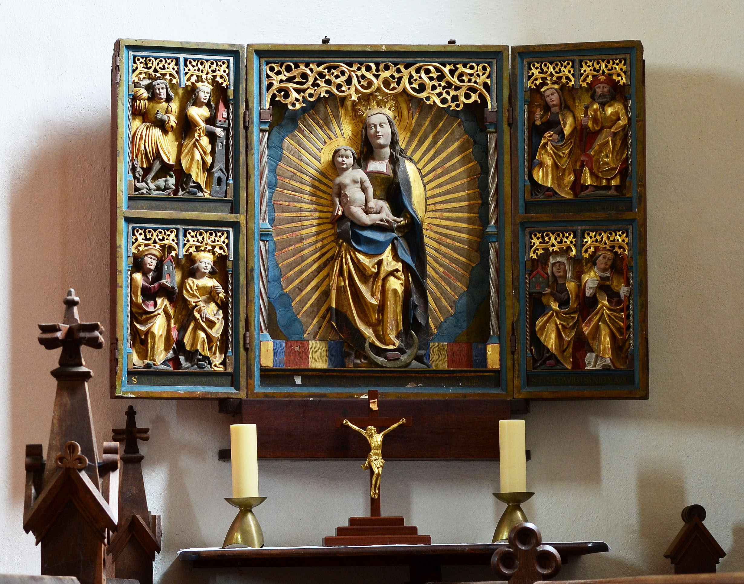 Röbel, Marienkirche, Schnitzaltar im südlichen Seitenschiff,Anfang 16. Jh. 2